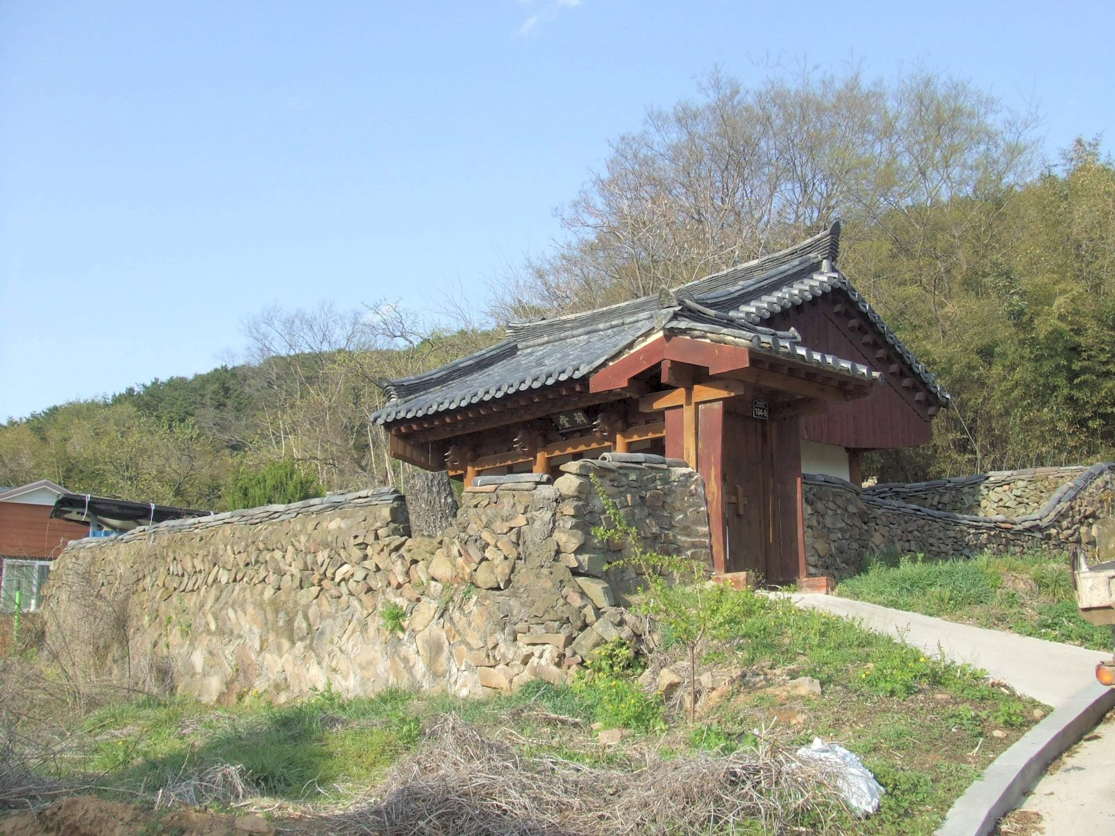 사당(문양리 동래정씨)